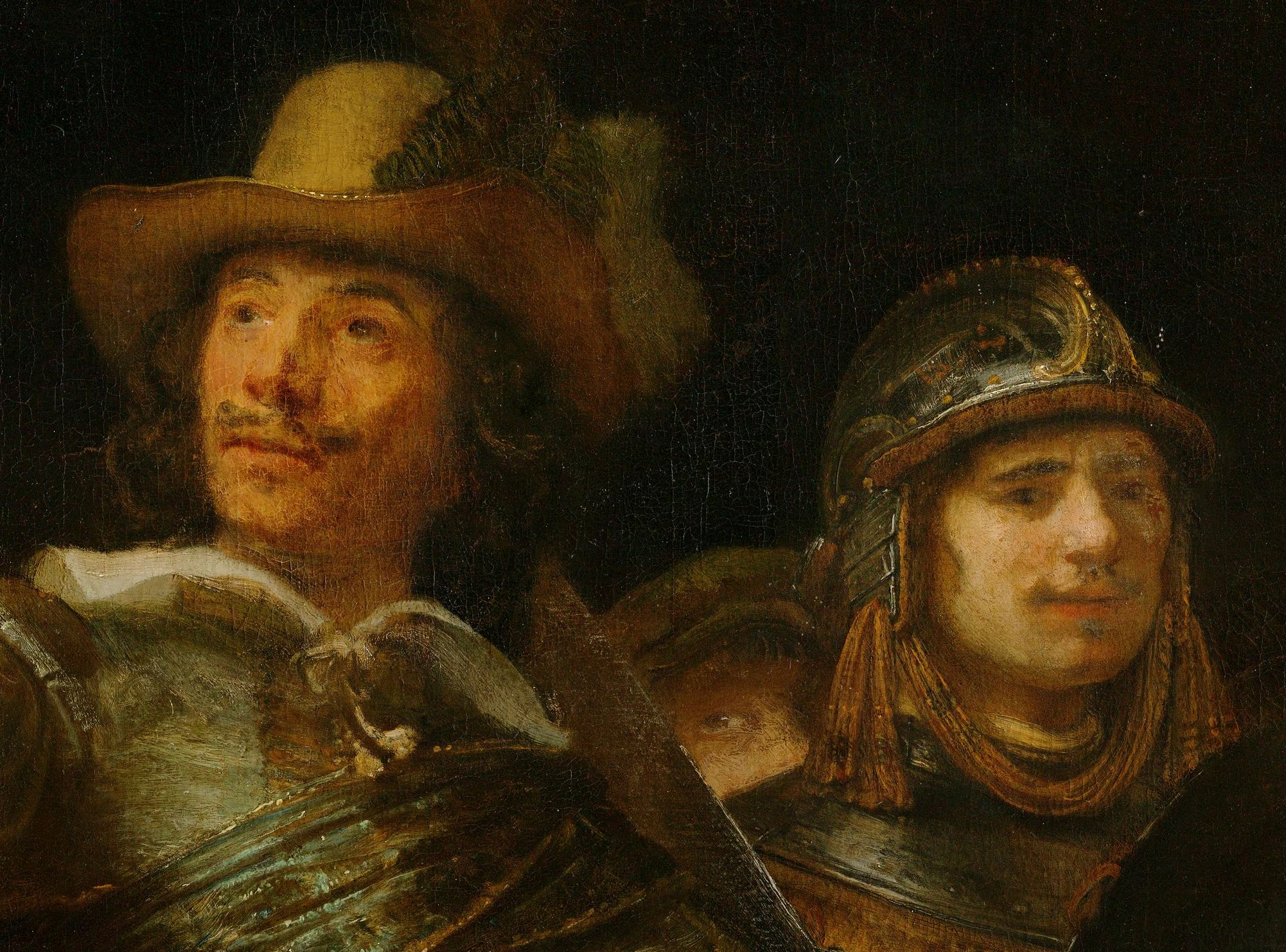 Frans Banning Cocq, heer van purmerlant en Ilpendam, Capiteijn Willem van Ruijtenburch van Vlaerdingen, heer van Vlaerdingen, Luijtenant, Jan Visscher Cornelisen Vaendrich, Rombout Kemp Sergeant, Reijnier Engelen Sergeant, Barent Harmansen, Jan Adriaensen Keyser, Elbert Willemsen, Musketier Jan Clasen Leydeckers (behind the Lieutenant in Yellow blowing into the powder pan of a musket which once belonged to Jan Snedeker), Jan Ockersen, Jan Pietersen bronchorst, Harman Iacobsen wormskerck, Jacob Dirksen de Roy (the Governor on far left of the cut off section of the painting), Jan vander heede, Walich Schellingwou, Jan brugman, Claes van Cruysbergen, Paulus Schoonhoven